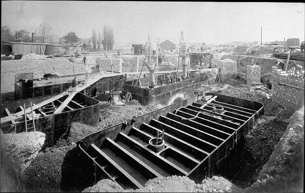 Exposition universelle de 1889 / Etat d'avancement des travaux de la tour au 28 avril 1887. / G. Eiffel, ingénieur et constructeur. Pile avant côté Paris n° 1. Tirage sur papier albuminé d'après négatif sur verre au collodion, 27,5 x 43 cm. Série de planches des travaux de la tour donnée par Gustave Effeil à Edouard Lockroy, alors ministre de l'Instruction publique. BnF, Estampes et Photographie, ancienne collection Georges Sirot, Va 75 boîte folio, VIIe arr.